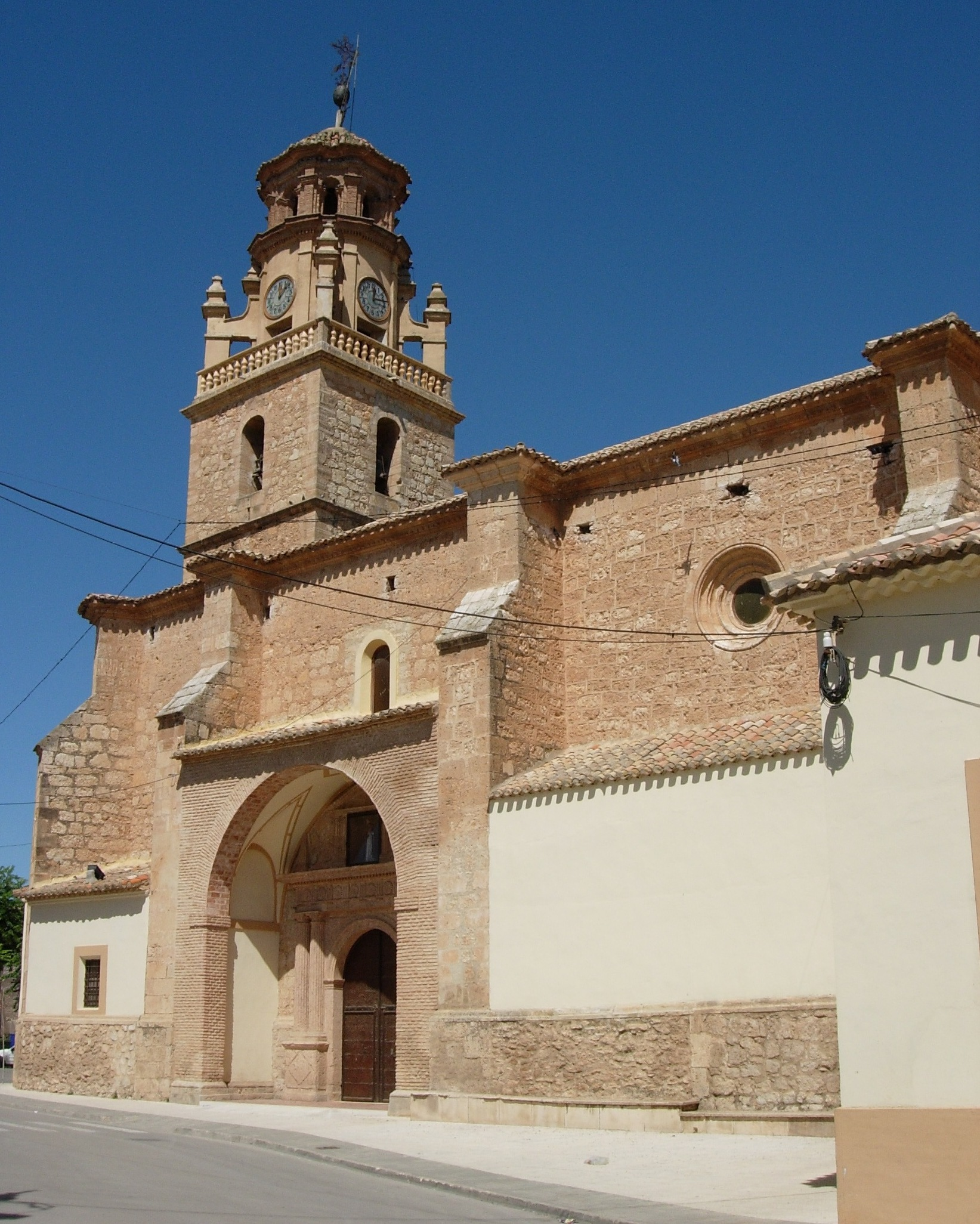 Iglesia de La Gineta (Albacete, España)